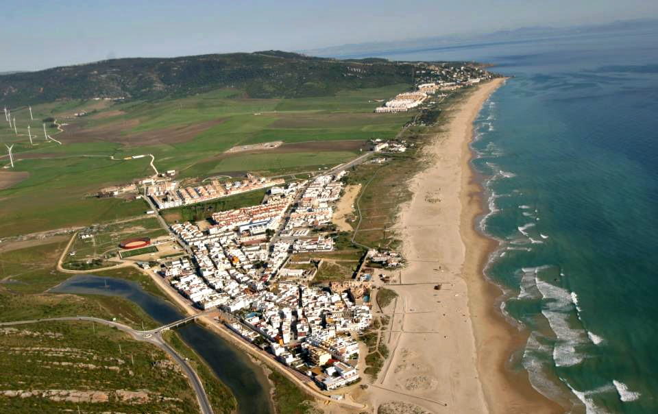 Zahara de los Atunes a vista de pájaro